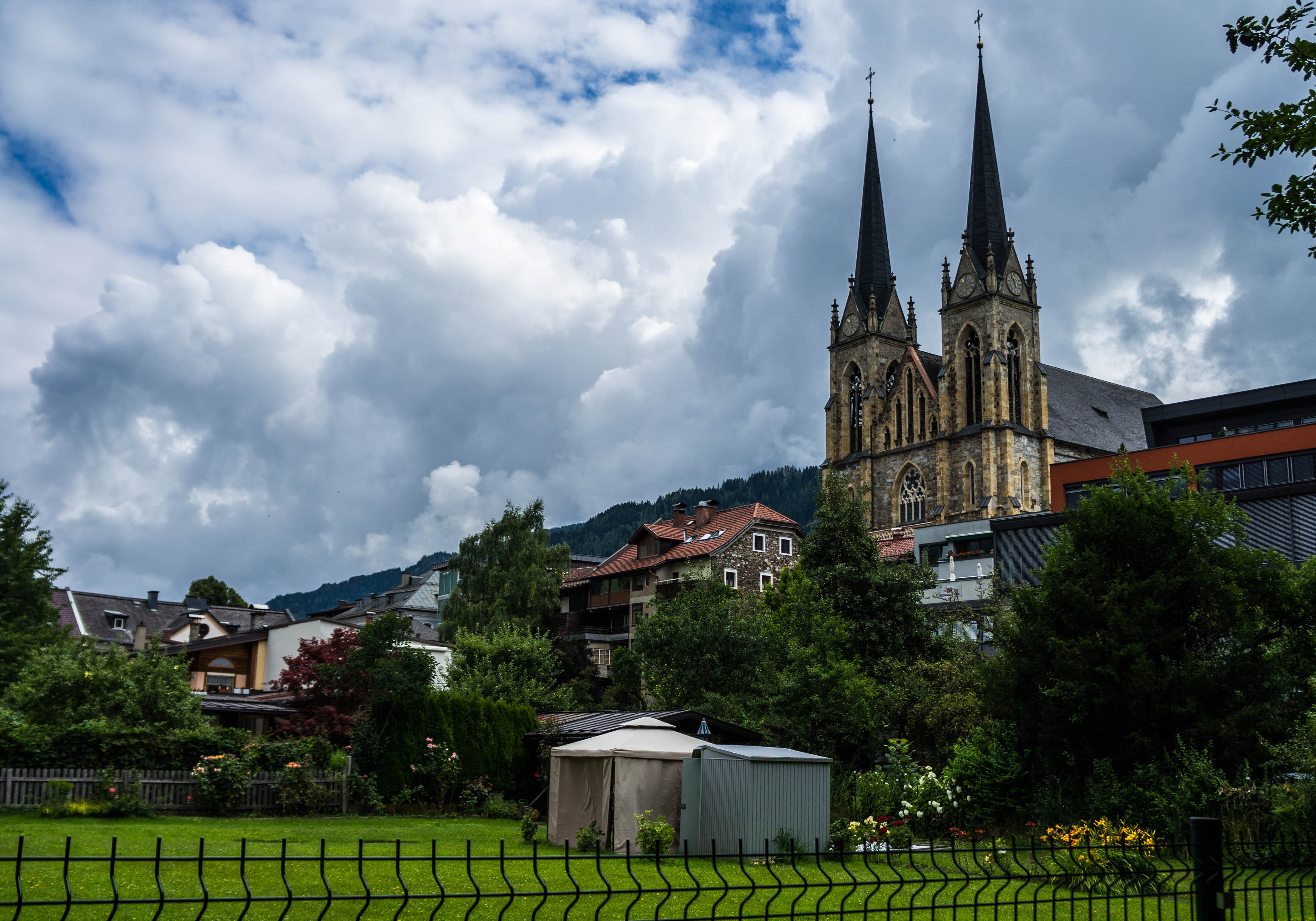 St Johann, Austria